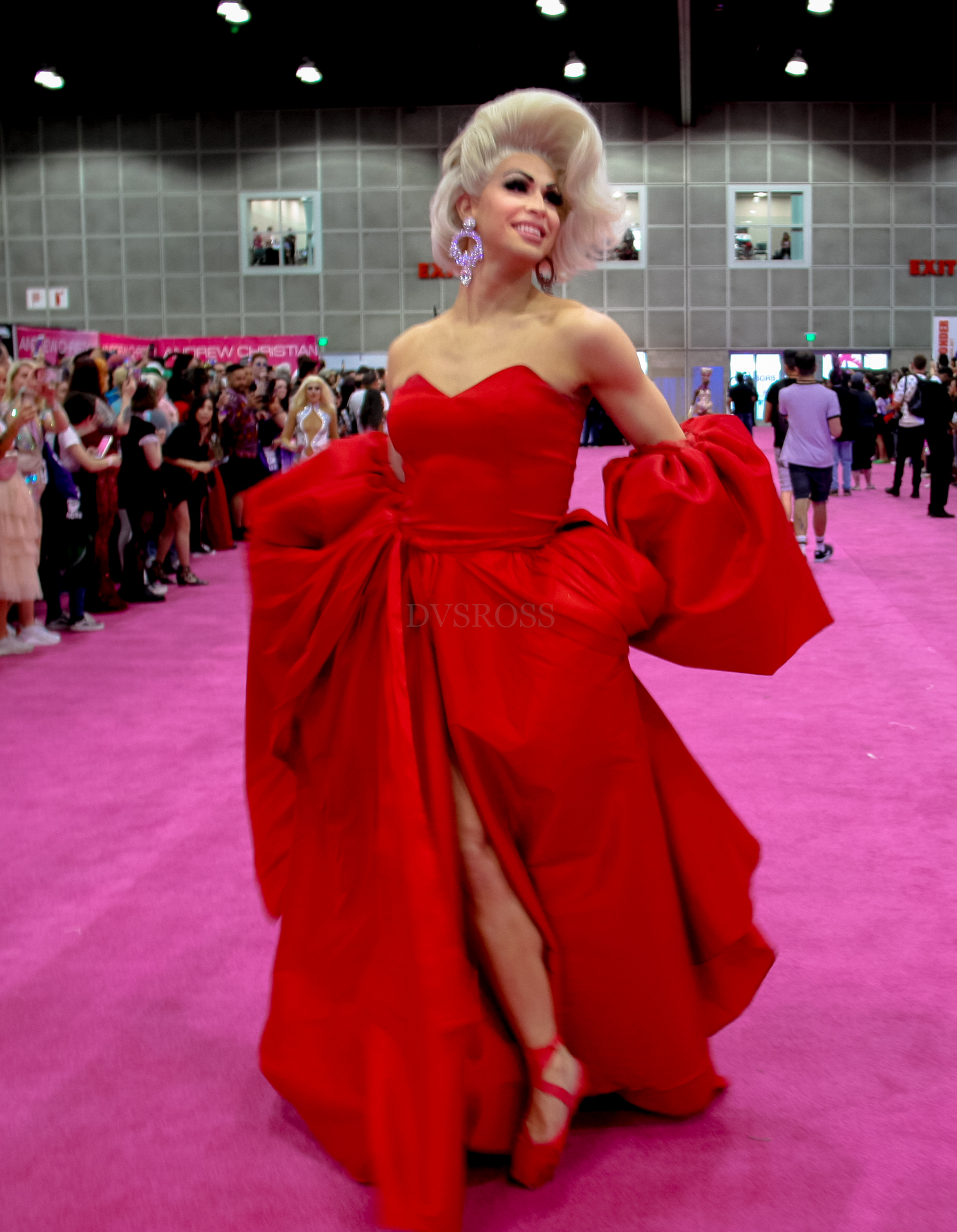 Rupaul DragCon 2019 - Los Angeles